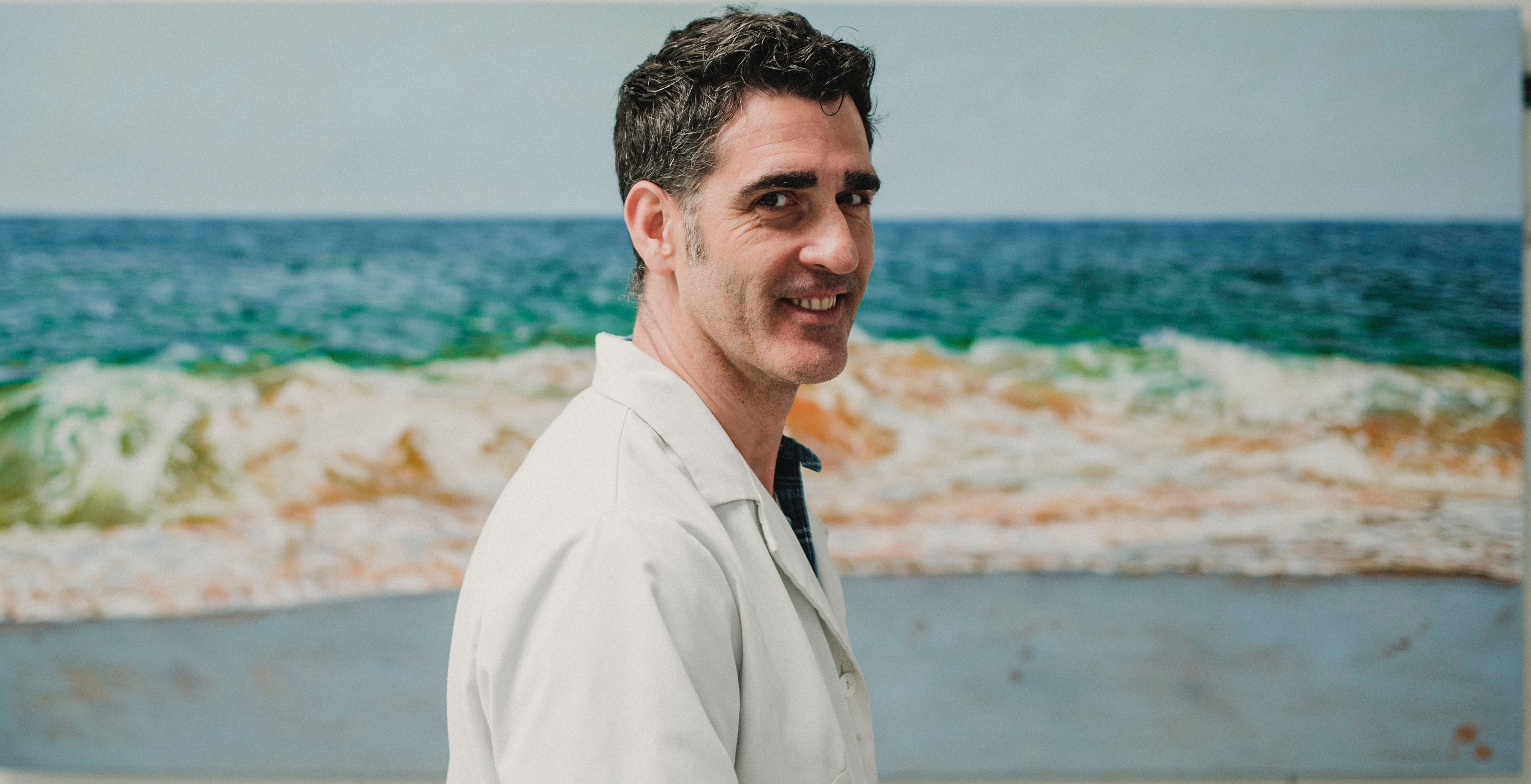 foto Iñigo